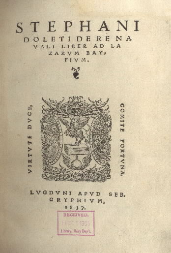 De re navali, stampato a Lione nel 1537 da Étienne Dolet